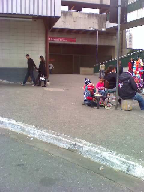 Entrada da estação Bresser-Mooca da Linha 3-Vermelha